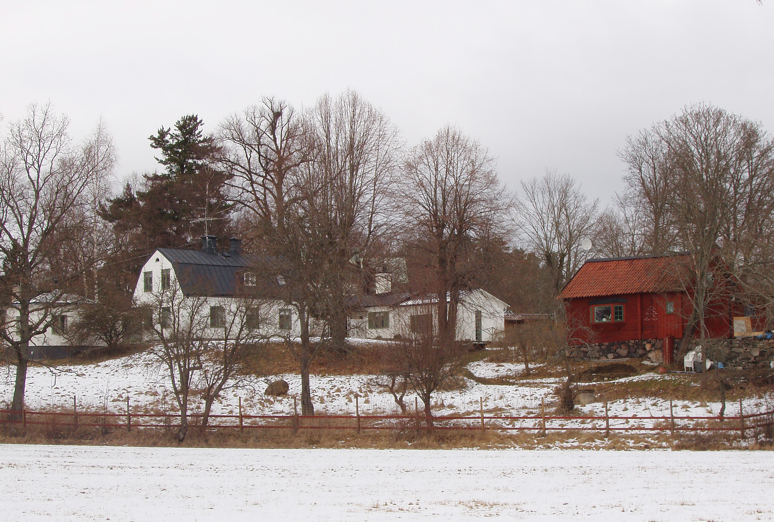 Långnäs gård på Lidingö, Stockholms län.